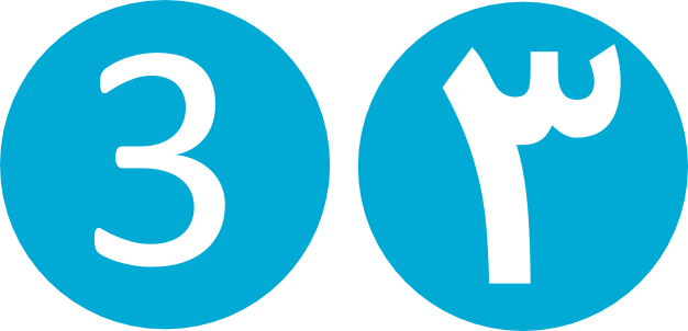 علامت خط 3 مترو تهران